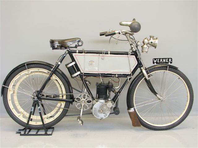 Werner 230 cc motorcycle from 1904